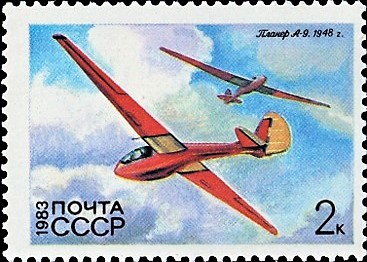 Почтовая марка СССР. А-9. Номер в каталоге ЦФА 5367